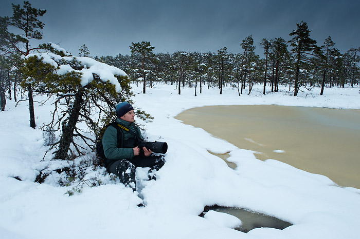 Eesti loodusfotograaf Sven Začek.